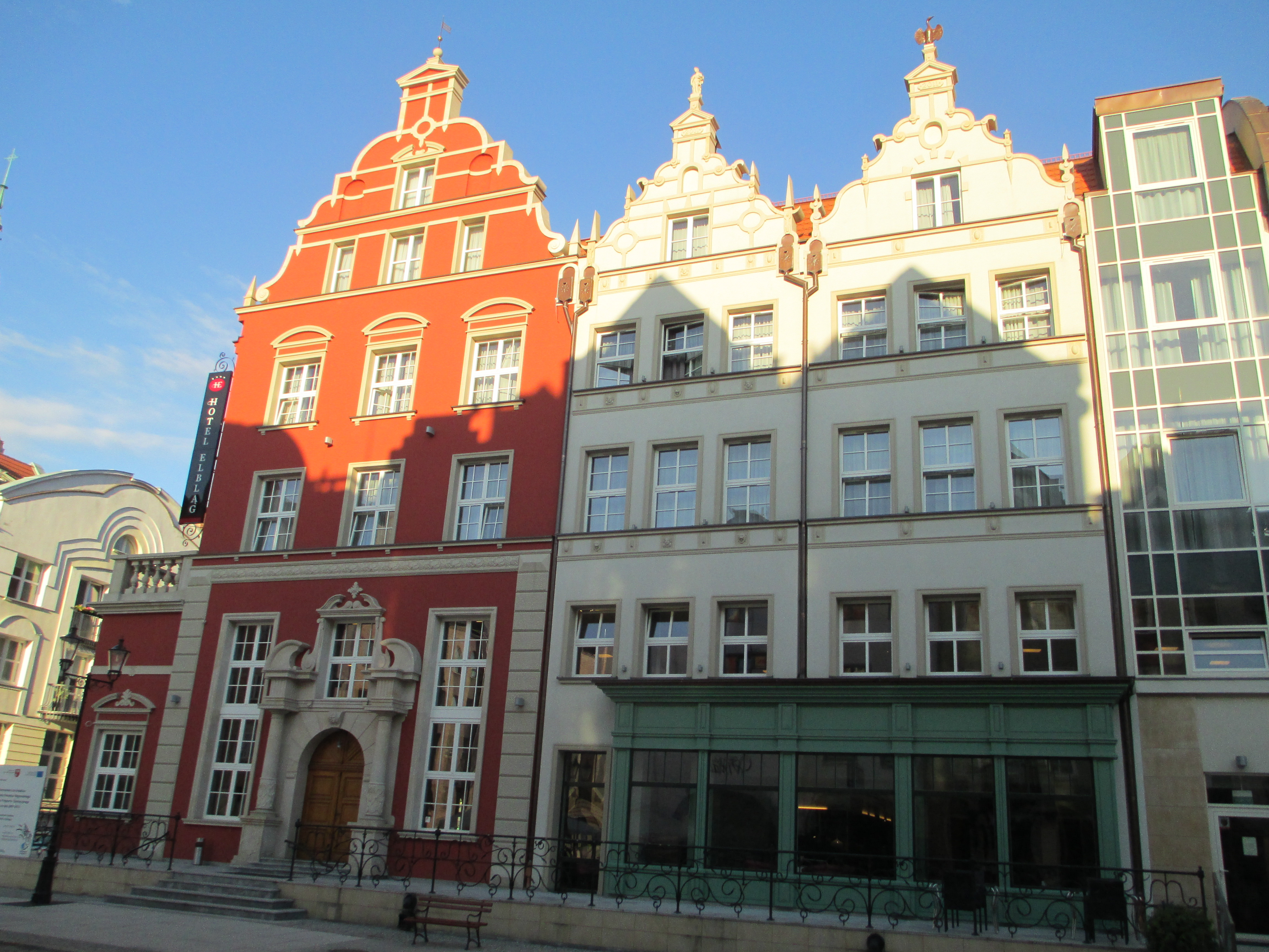 בתים ישנים-משוחזרים ברובע העתיק באלבלאג